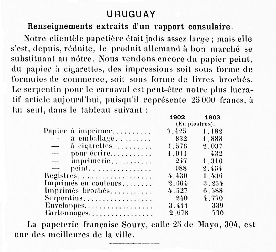 Extrait d'un rapport consulaire sur les exportations françaises de produits papetiers. La vente la plus importante est celle de serpentins pour le Carnaval.